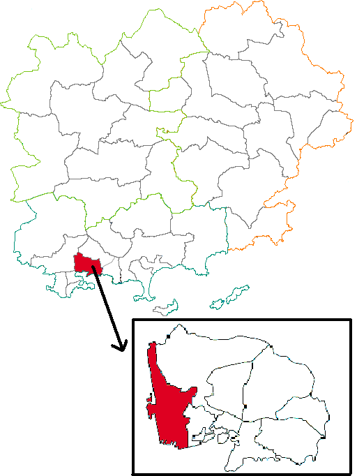 Situation du canton dans la département du Var (83), France